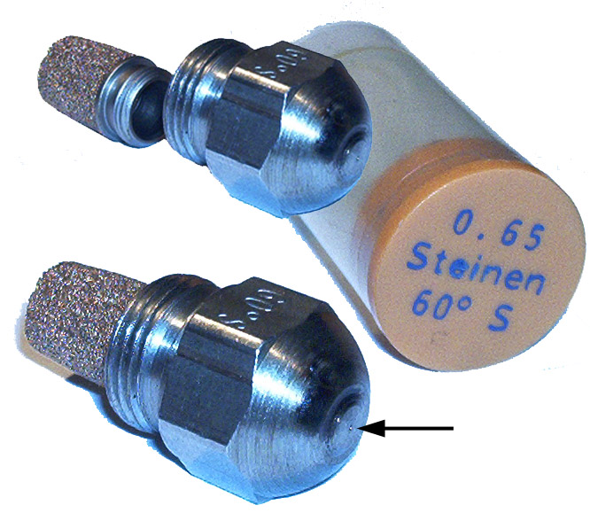 Zerstäuberdüse eines Oelbrenners mit Frittenfilter, 0,65 USgal/h Durchsatz, 60° Sprühwinkel, Sprühbild "S".